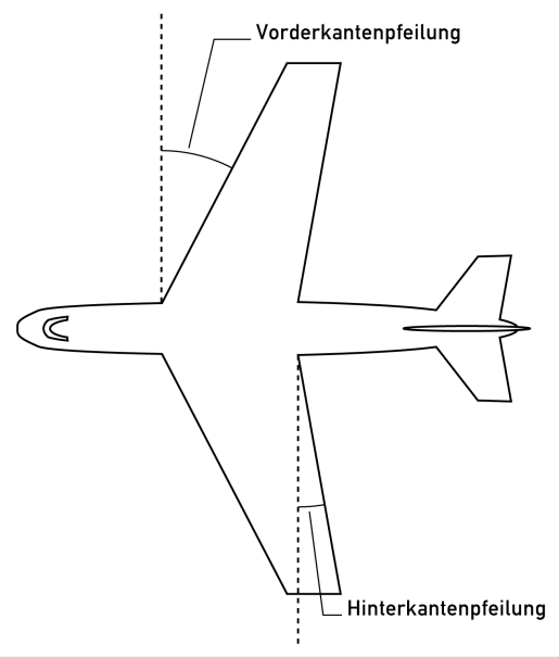 Schema Pfeilung Vorderkante Hinterkante